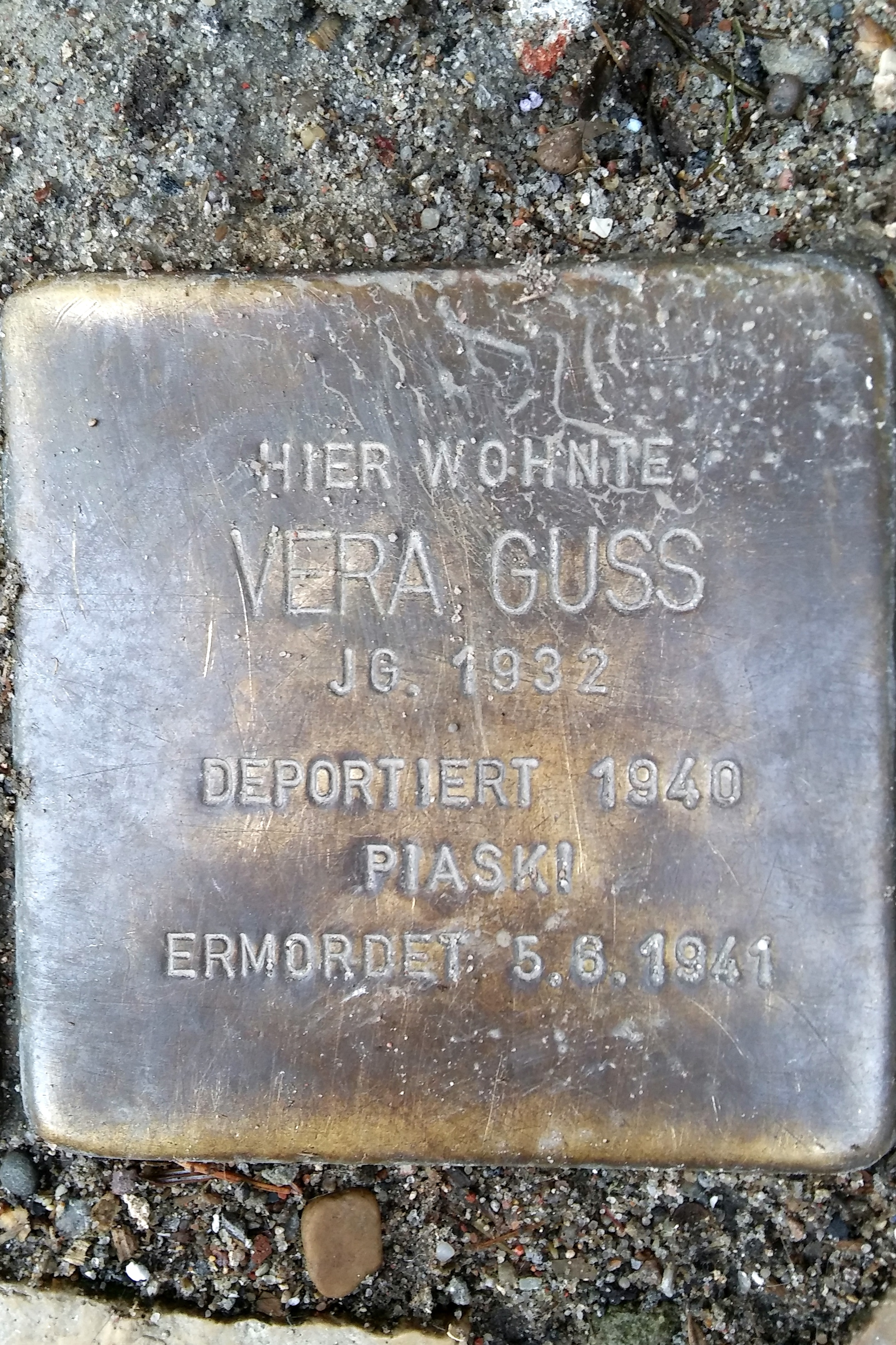 Stralsund, Badenstraße 41, Stolperstein Vera Guss (2017-02-22)